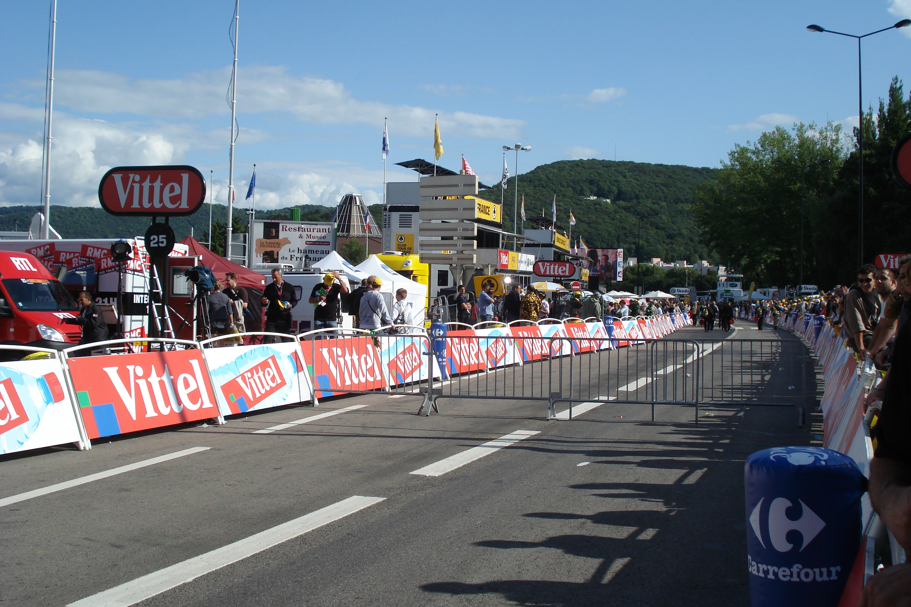 Le tour de France 2009 à Planoise, dans la ville de Besançon (Doubs, France).